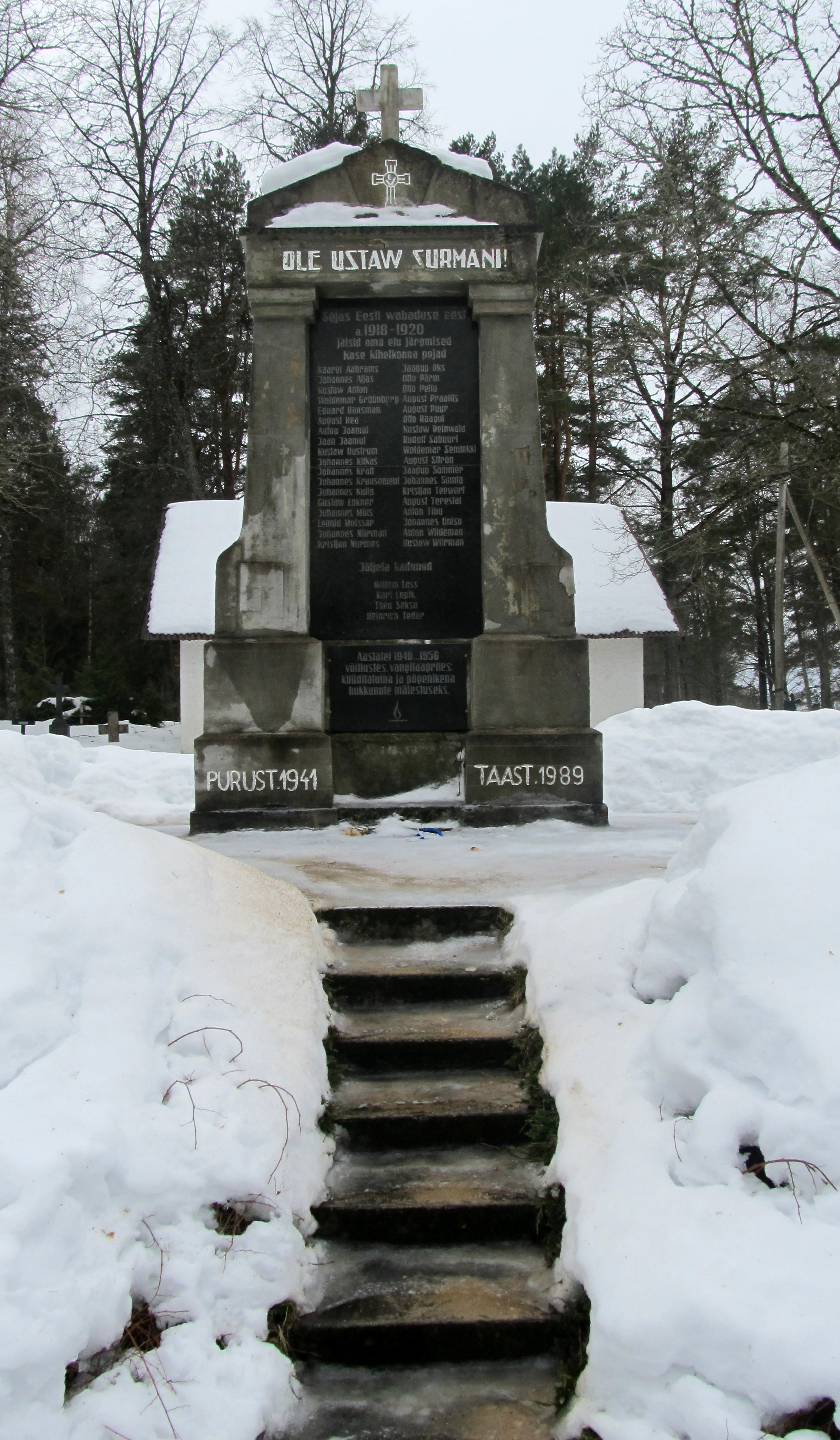 Vabadussõja mälestussammas Kose kalmistul